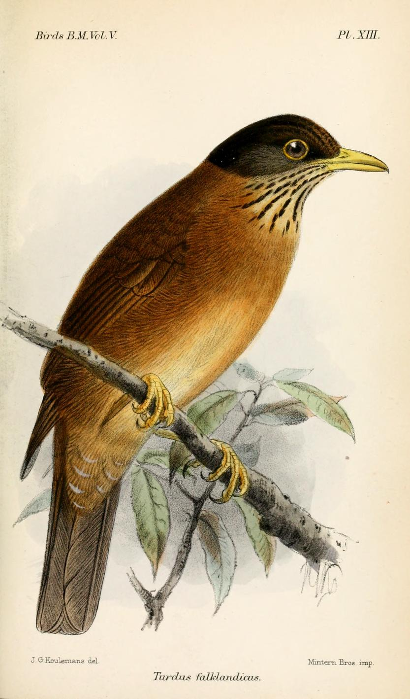 Turdus falklandicus = Turdus falcklandii falcklandii, Austral Thrush ssp.